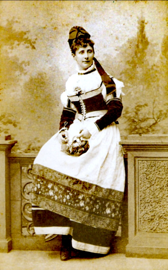 Olga Rodde (* 1846; † 1941), letzte Lübecker Angehörige der Kaufmannsfamilie Rodde